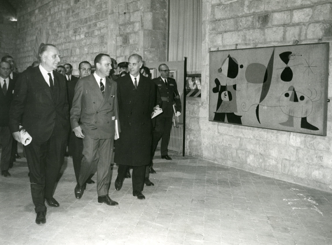 El alcalde Porcioles y el ministro Manuel Fraga en la inauguración de una exposición de Joan Miró en el Antiguo Hospital de la Santa Cruz (1968).